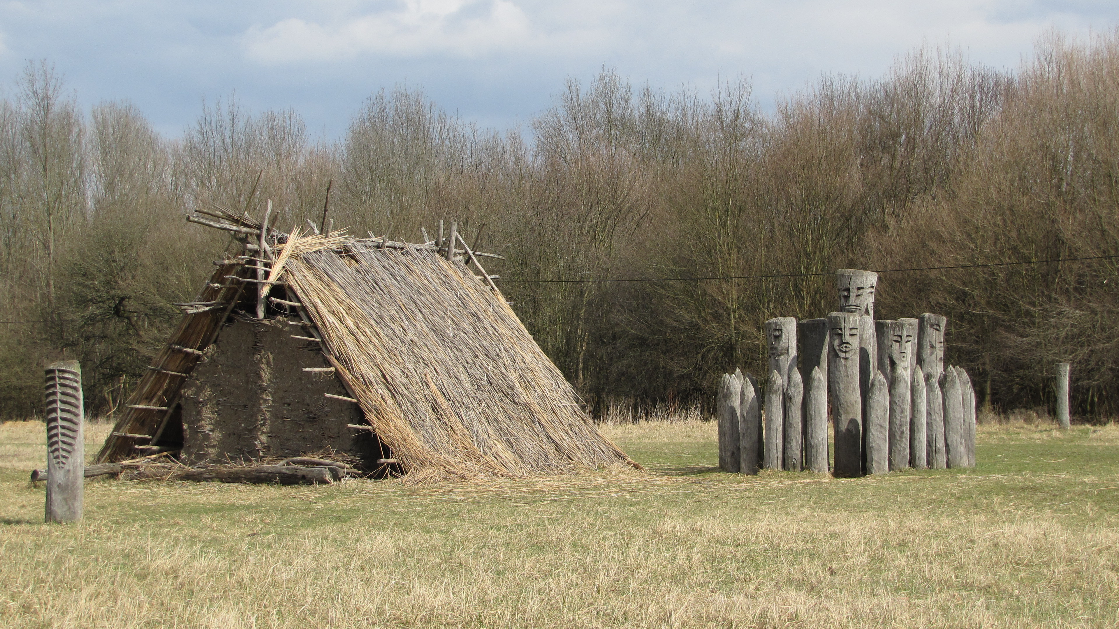 Bývalé hradiště Pohansko u Břeclavi